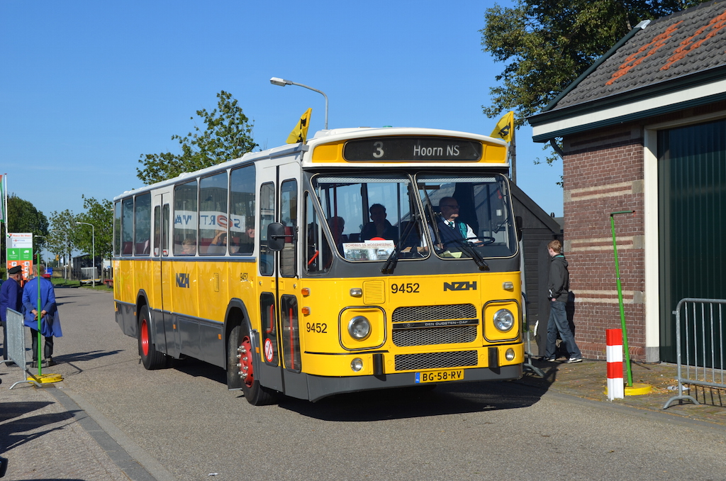 NZH-bus 9452 van het NZH-Vervoermuseum te Wognum. Foto: Erik Swierstra.